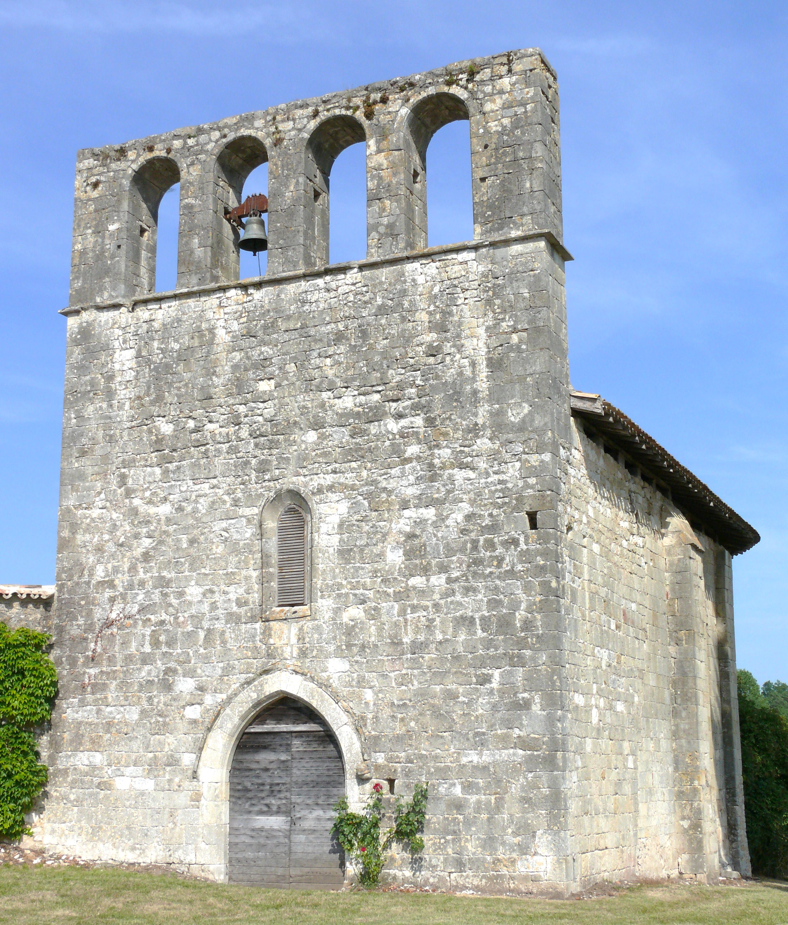 Laussou - Eglise Saint-Pierre - Ensemble